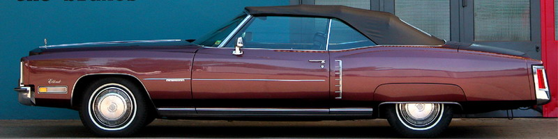 1972 Cadillac Eldorado Convertible